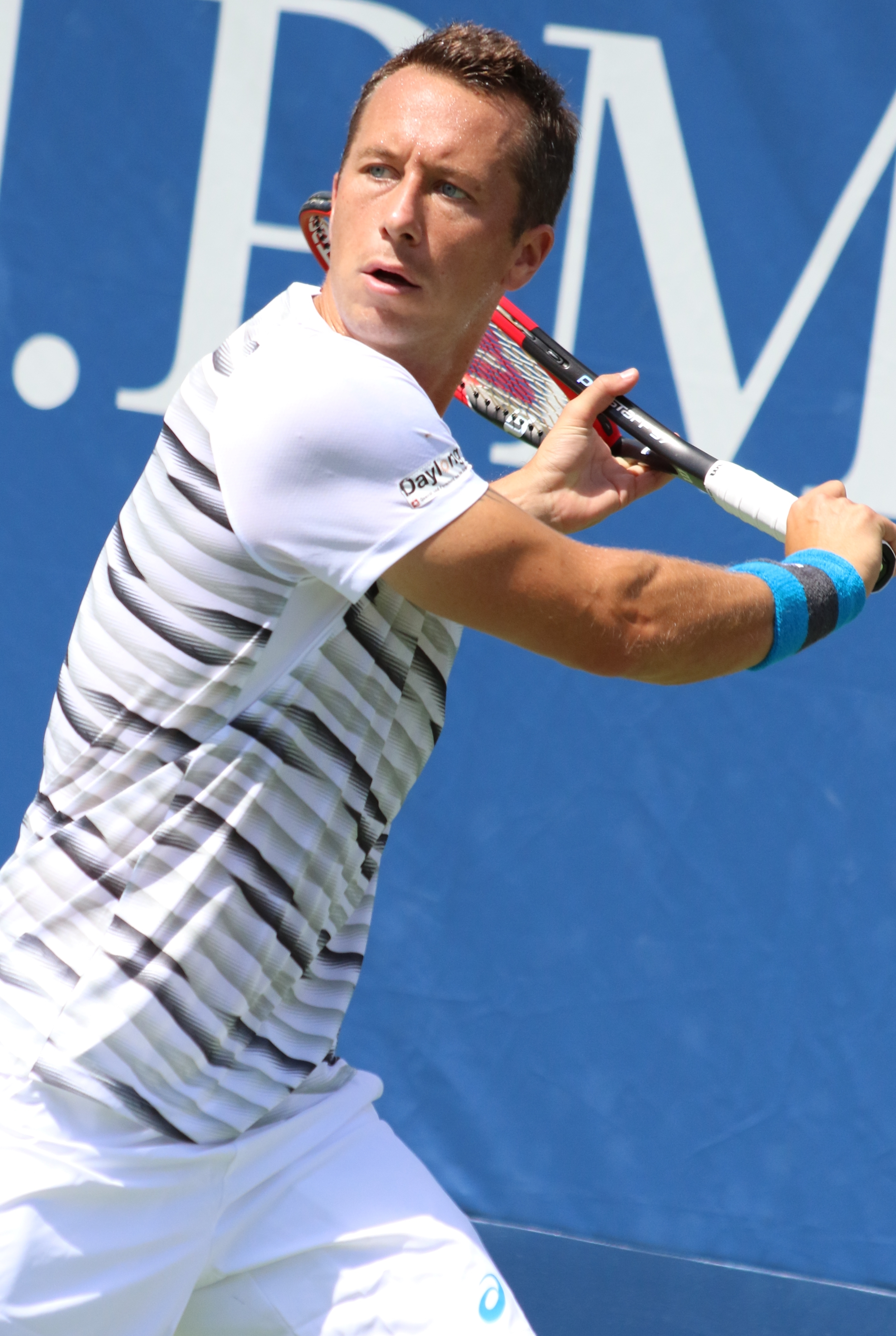 Kohlschreiber US16 (11)